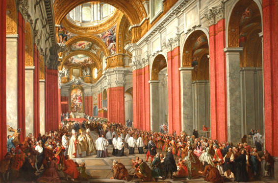 La consacrazione del cardinale Giuseppe Pozzobonelli a Roma dipinta dal vedutista piacentino Giovanni Paolo Pannini